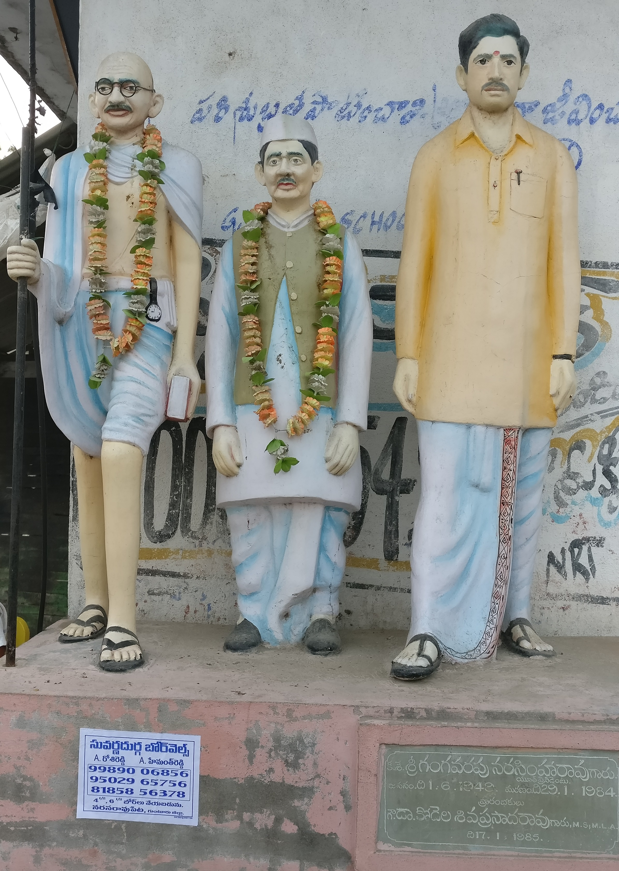 Statues in Kandlagunta Village